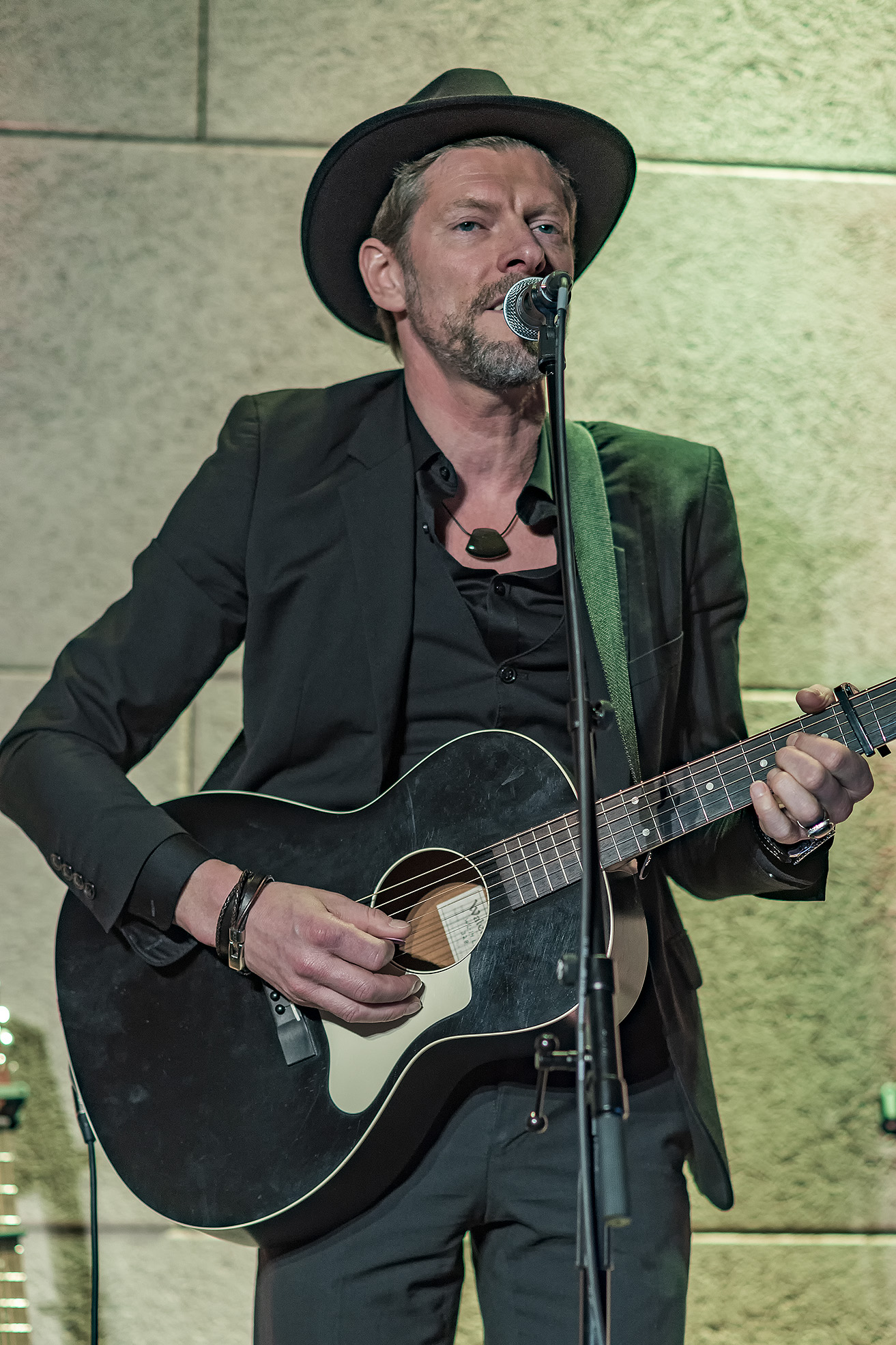 Gunther Verspecht tijdens optreden met Stash op 19/02/2020 te Londerzeel